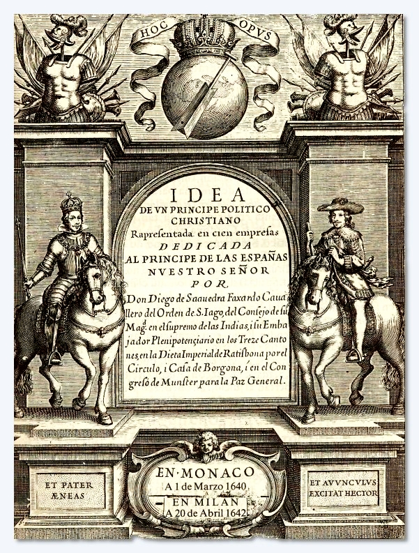 Portada de “Idea de un príncipe político cristiano” de Diego Saavedra Fajardo